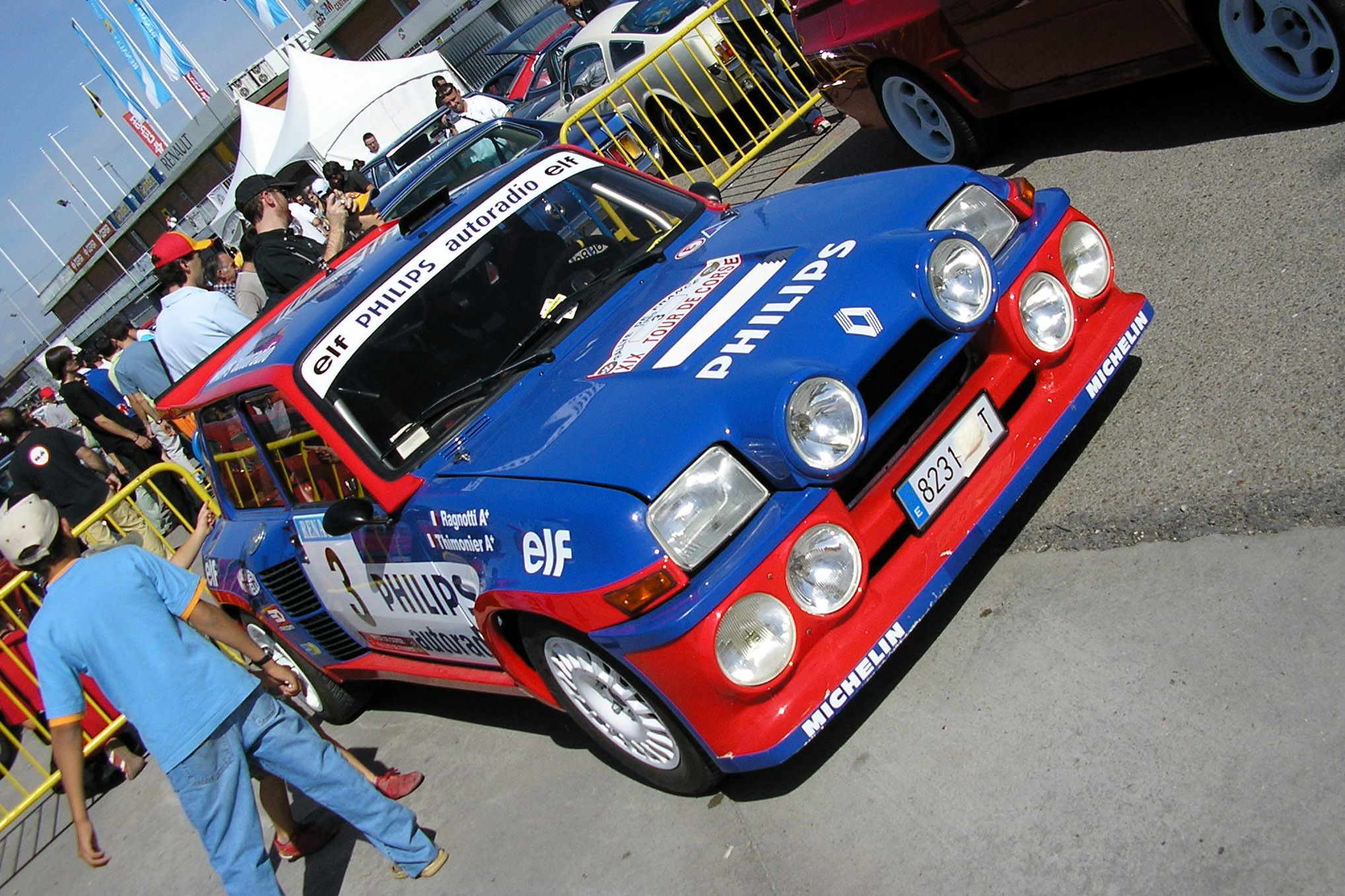 Renault 5 Maxiturbo shown in Circuito del Jarama (Madrid). Jornada de puertas abiertas 2006.